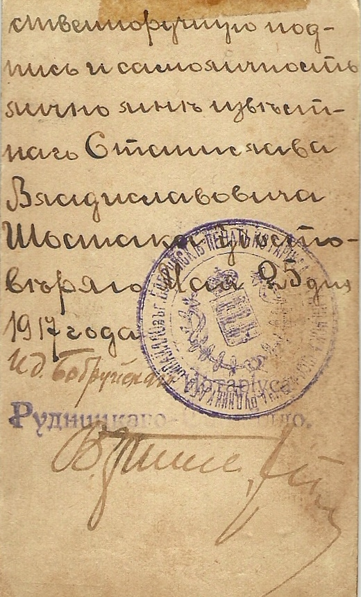 Stanisław Szostak - matura